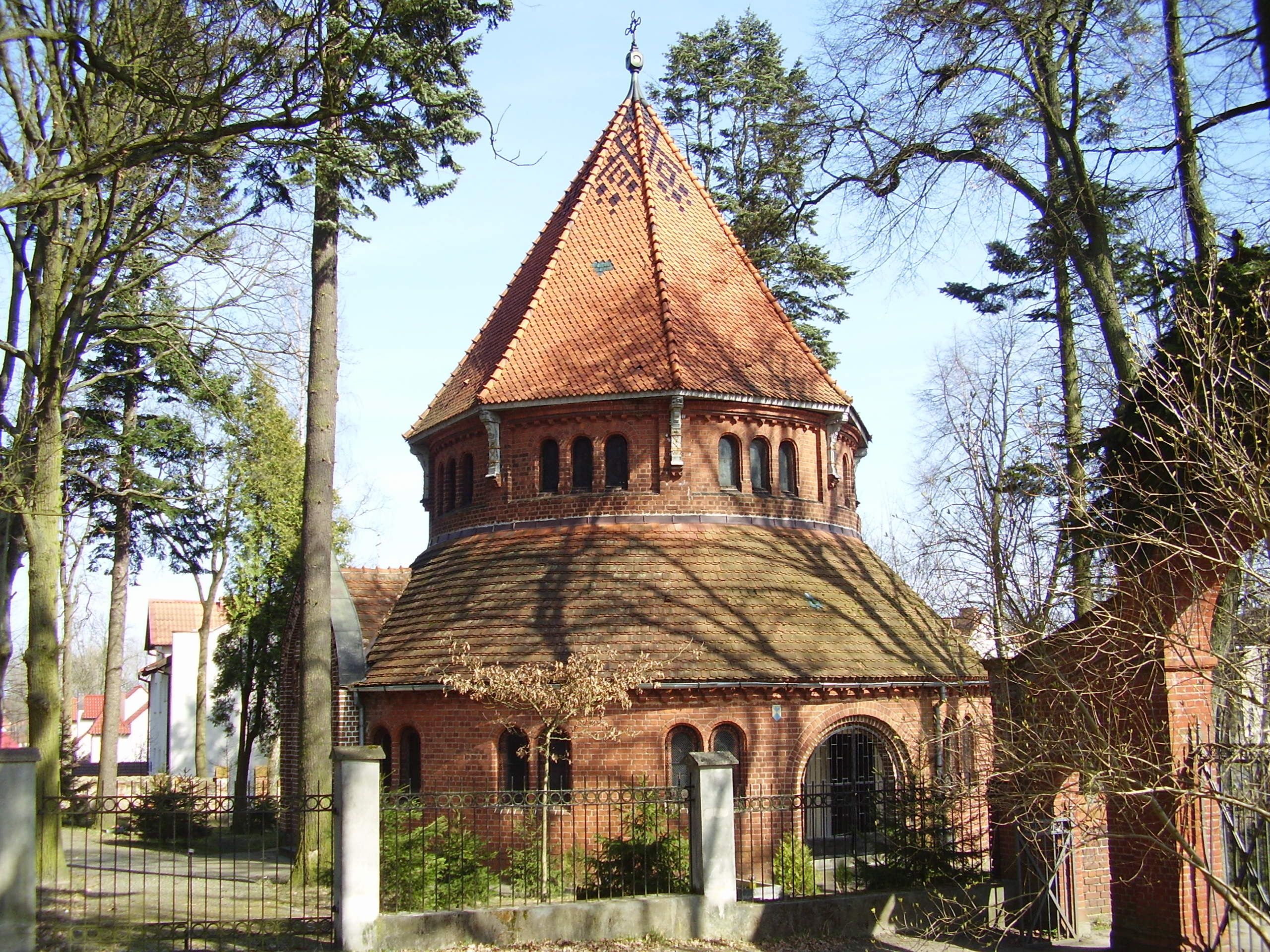 Wałcz, kaplica cmentarna ewangelicka, ob. cerkiew prawosławna p.w. Św. Trójcy, 2 poł. XIX